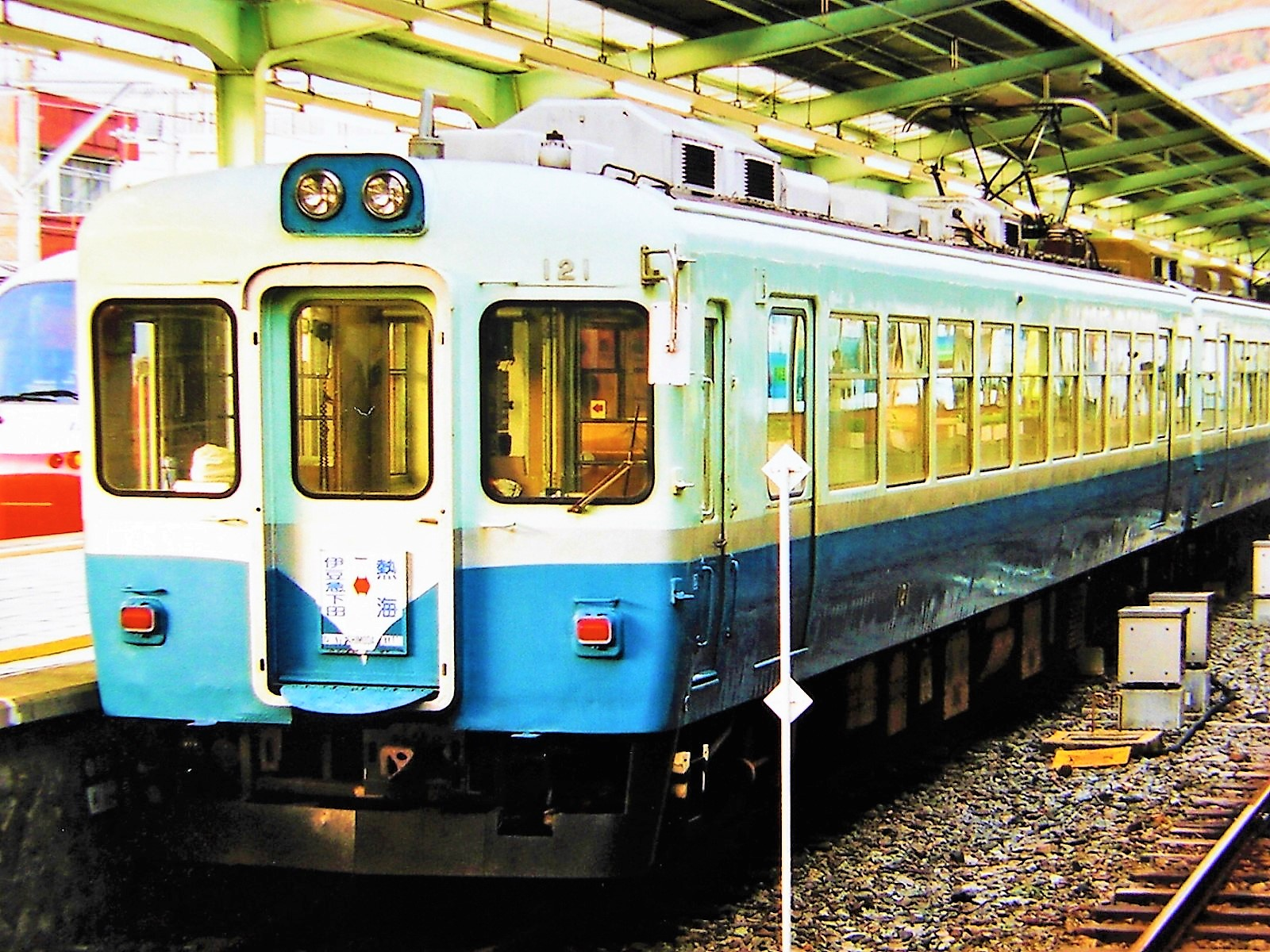 伊豆急行電鉄100系クモハ121